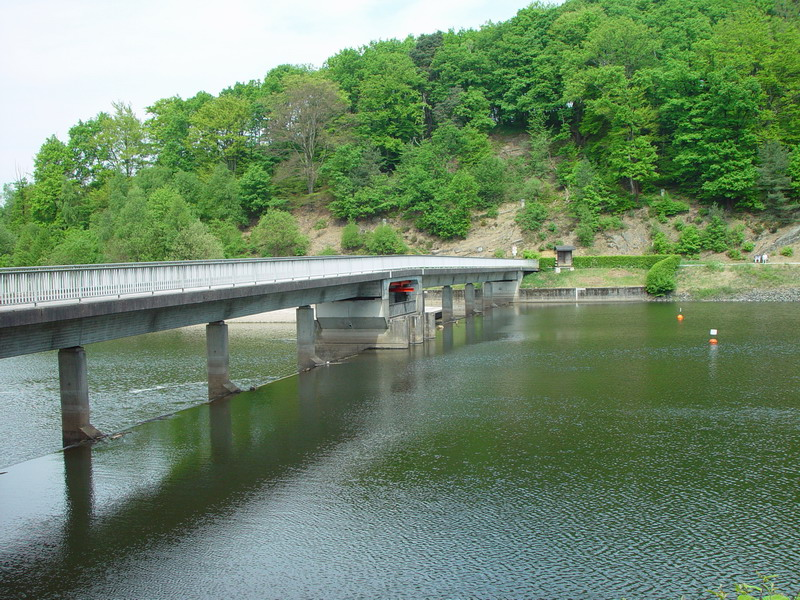 Die Brücke über das Stauwehr der Wupper-Vorsperre in Hückeswagen